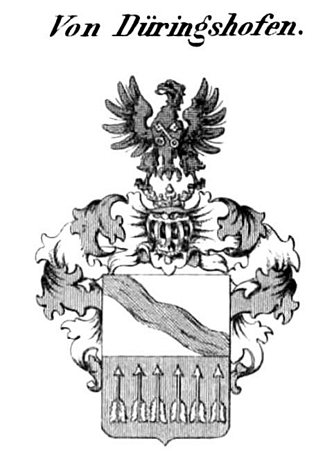 Wappen des preußischen Adelsgeschlechtes von Diringshofen bzw. Düringshofen